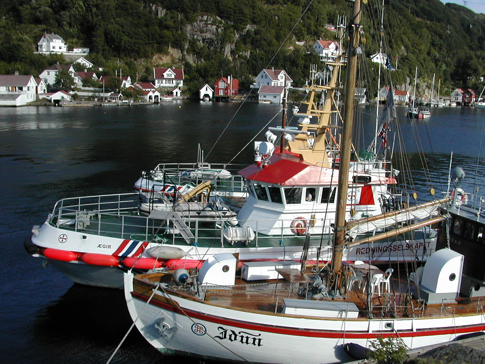 Den gamle skøytestasjonen i Rasvåg. RS Ægir og RS Idun